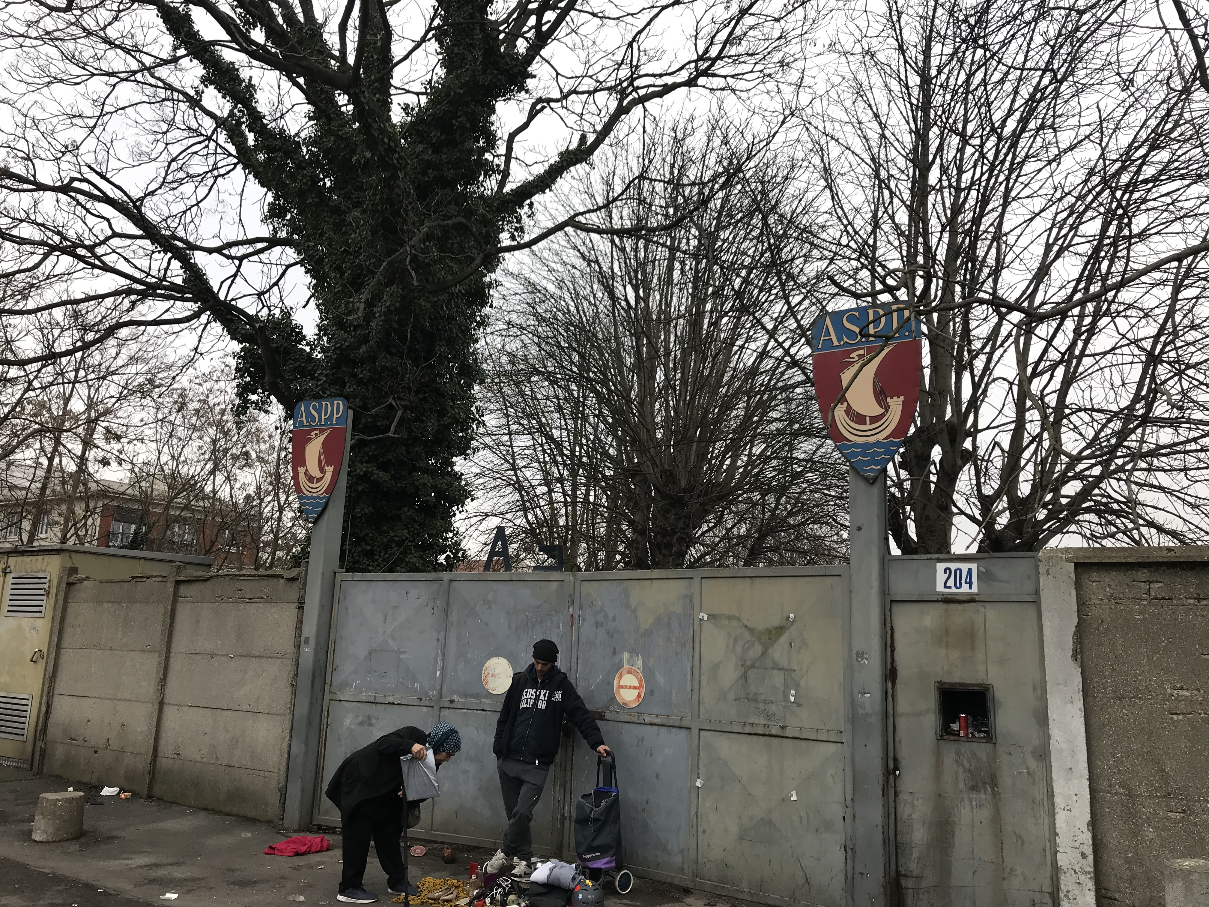 Entrée du stade Gaston Faralicq à Pantin aux couleurs de l'ASPP